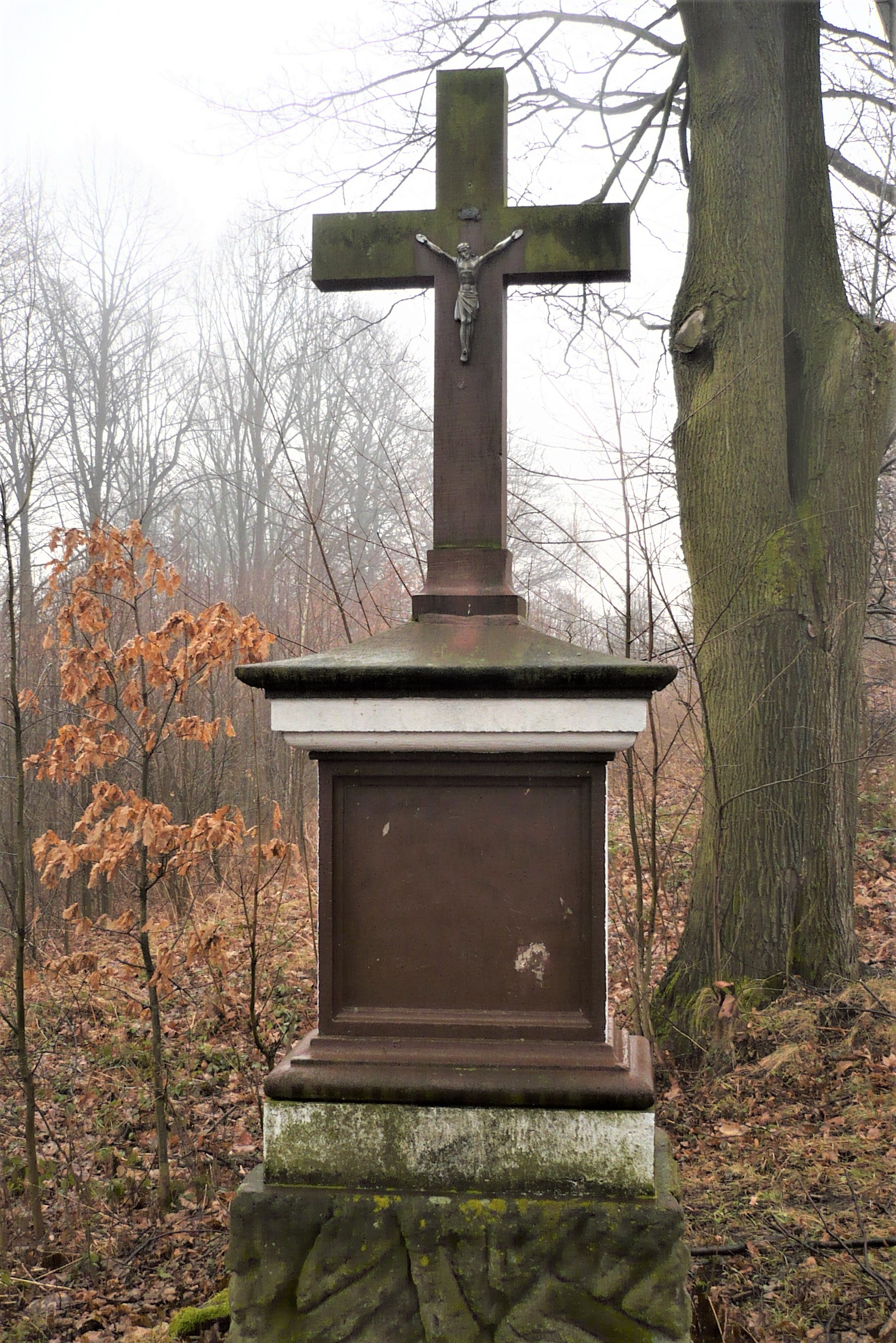 Kaplica dziękczynna w Nowej Rudzie - Słupcu